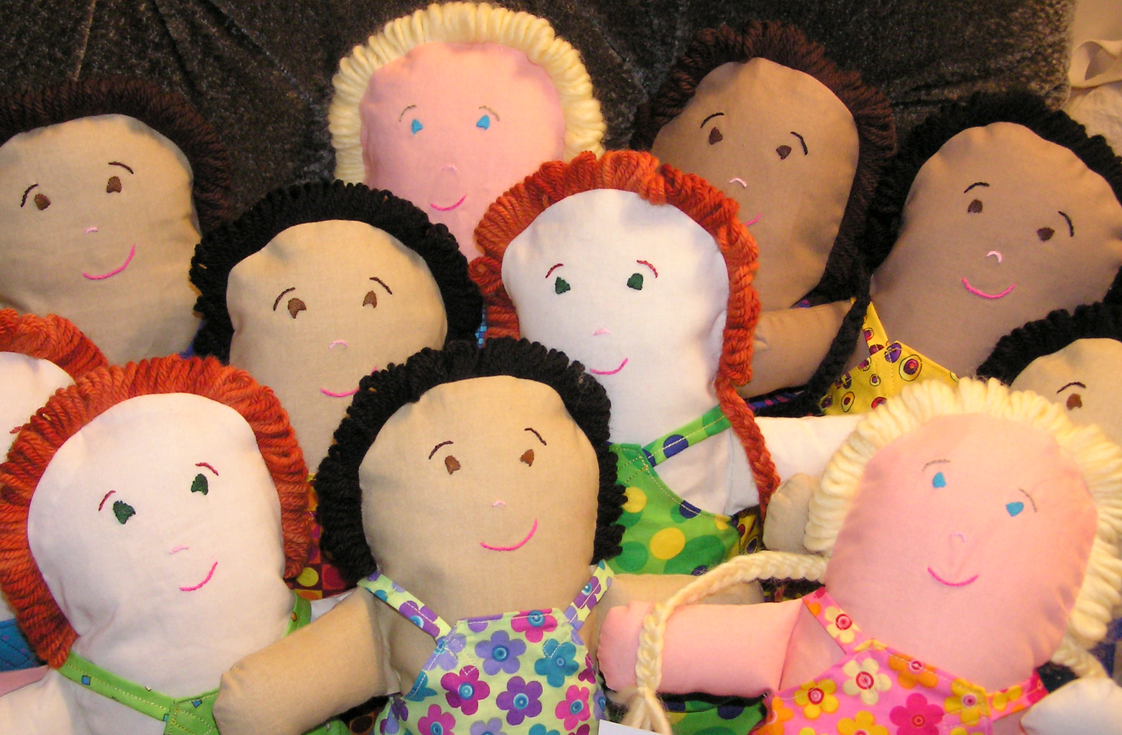 Hand-made dolls.